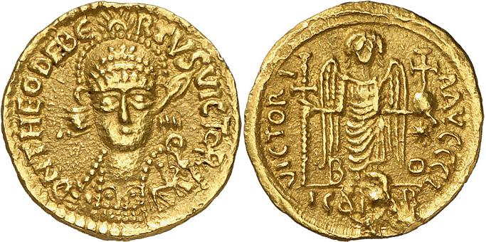 Solidus frappé après 540 à Bonna, Bonn (Allemagne). Avers : DN THEODEBE/RTVS VICTOR buste de face, lance sur l’épaule droite. Le buste est casqué, le casque orné de trois rangs de perles, surmonté d’un cimier. Sur l’épaule gauche, un bouclier sur lequel est représenté un cheval. Revers : VICTORI/A AVCCCCI Victoire debout de face, tenant une longue croix et un globe crucigère. Lettres B et O de part et d’autre de la Victoire. Etoile dans le champ à droite ICONOB à l’exergue. Le style de ce solidus n’est pas sans rappeler le prototype byzantin. Seul le nom du souverain change. Au lieu de la légende DN IVSTINIANVS PP AVG on lit DN THEODEBERTVS VICTOR. Cette titulature rappelle la victoire du roi lors de son expédition en Italie ; elle est postérieure à 540. Le titre de VICTOR se rencontre sur les solidi d’ateliers divers. La collection nationale en renferme une dizaine d’exemplaires. Cette nouvelle titulature commémore une victoire importante. Théodebert aurait fait frapper le solidus (la pièce la plus prestigieuse) au nom de l’empereur avant la campagne d’Italie en 540, et à son nom après la campagne. Cette expédition marque incontestablement une mutation monétaire et l’importance déjà grandissante des ateliers du midi. Voir Prou, p. XXXII. L’attribution à Bonn proposée depuis Belfort est confirmée par Lafaurie, RN, 1983, p. 120.